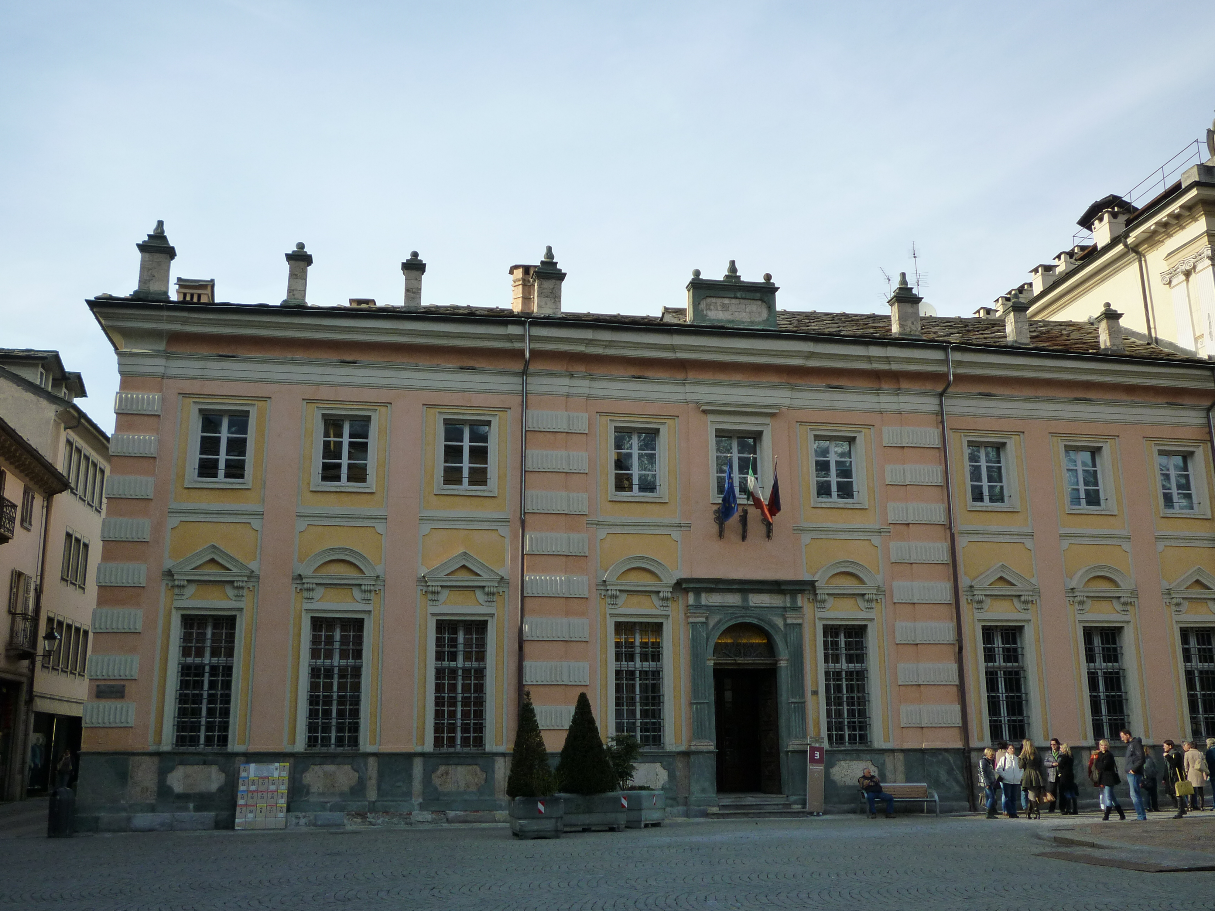 L'édifice siège de l'ancien Conseil des Commis (Hôtel des Etats) à Aoste, place Emile Chanoux